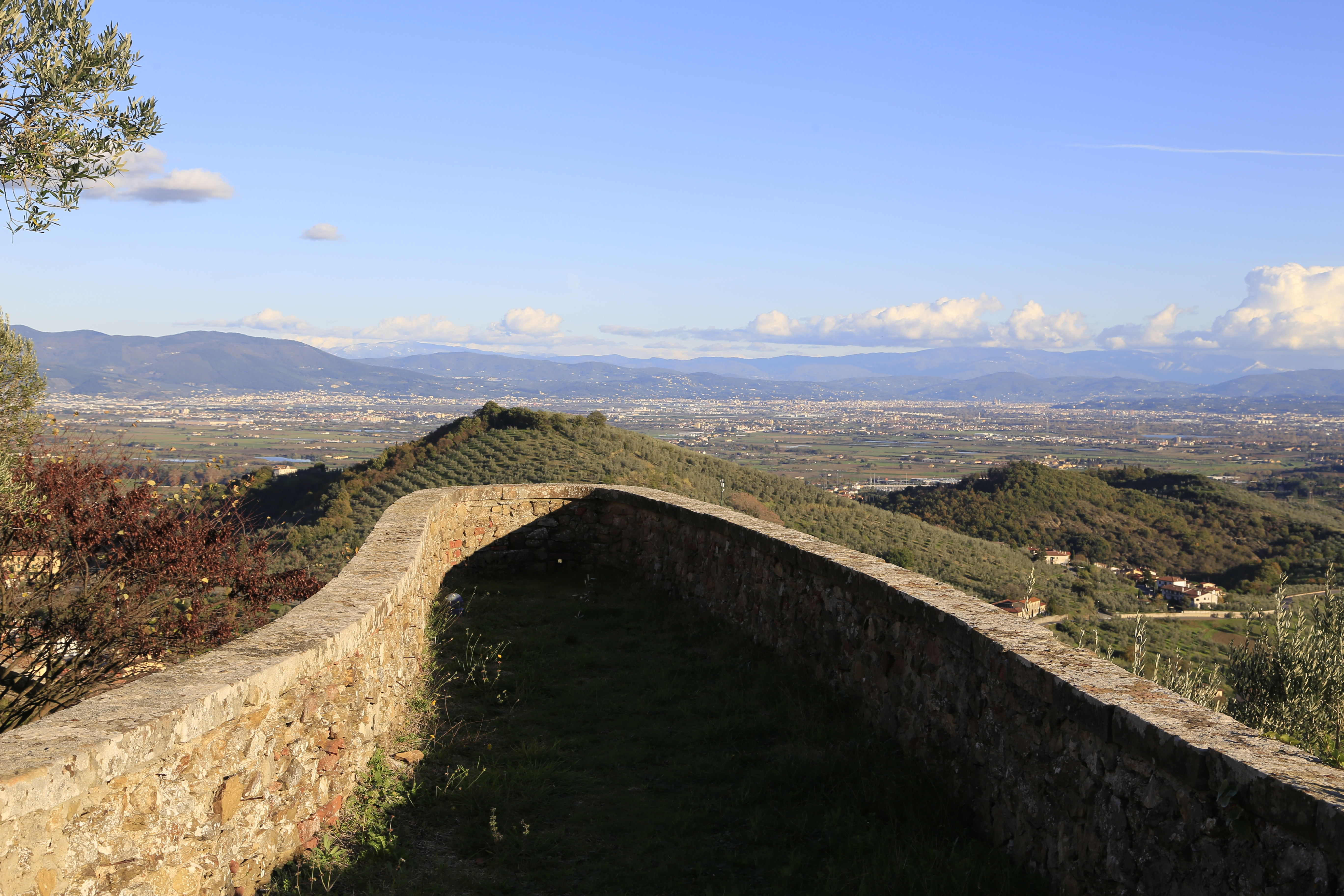 Bastione della rocca - Carmignano